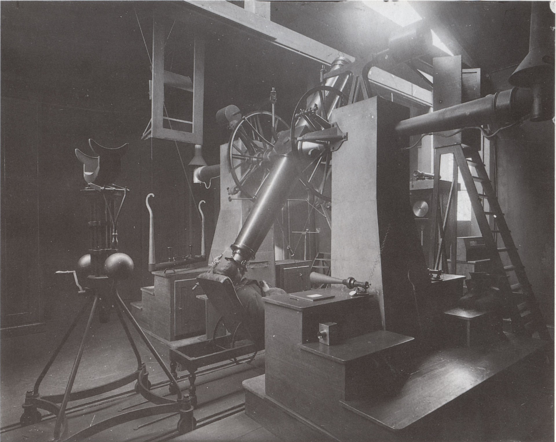 Die Universitätssternwarte in der Stephanstraße 3, um 1900.